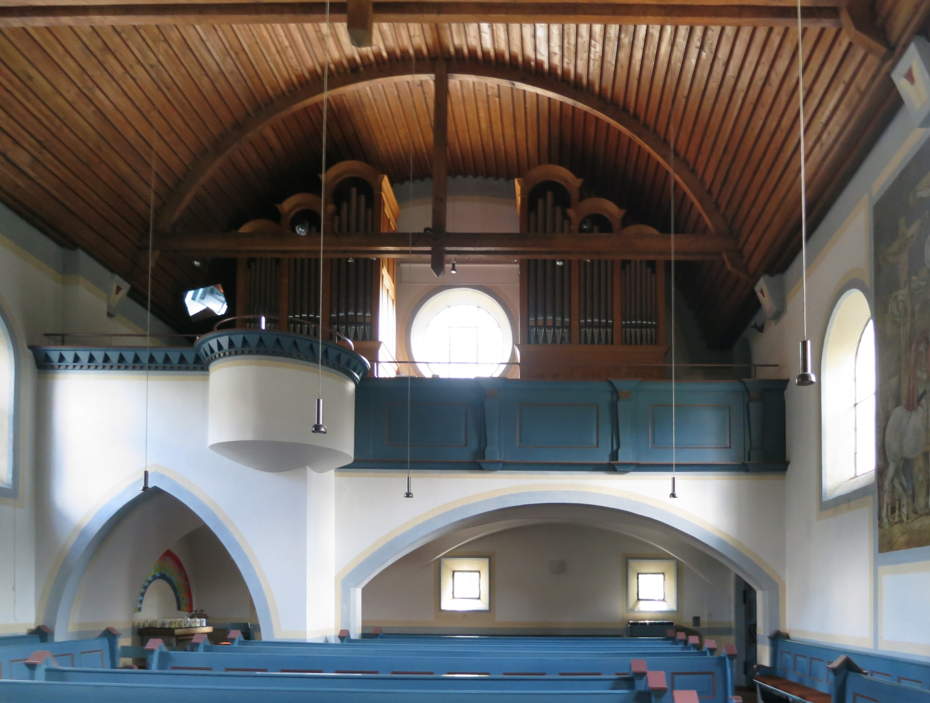 Kreuzkirche (evangelisch) in Pfaffenhofen an der Ilm. Langhaus, Blick nach SüdWest